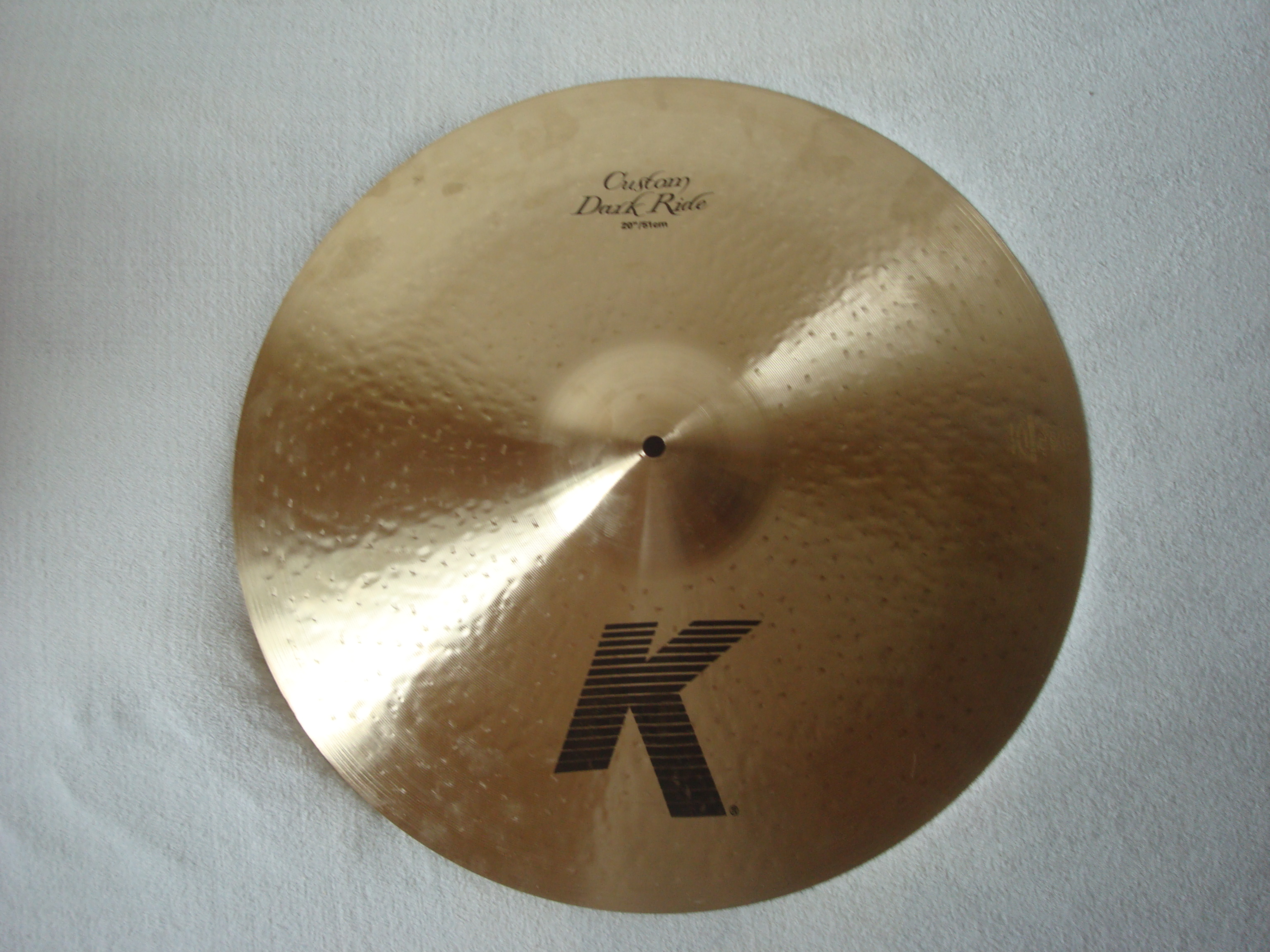 Mit eget Zildjian bækken som vil blive brugt i forbindelse med Avedis Zildjian artiklen på den danske encyklopædi. Bækkenet er mere præcis et K-Zildjian custom dark 20" ride cymbal